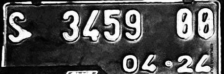 License Plat of Jombang Regency